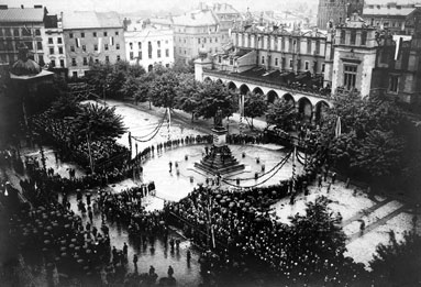 Juliusz Słowacki reburial, from France to Poland. 1927.